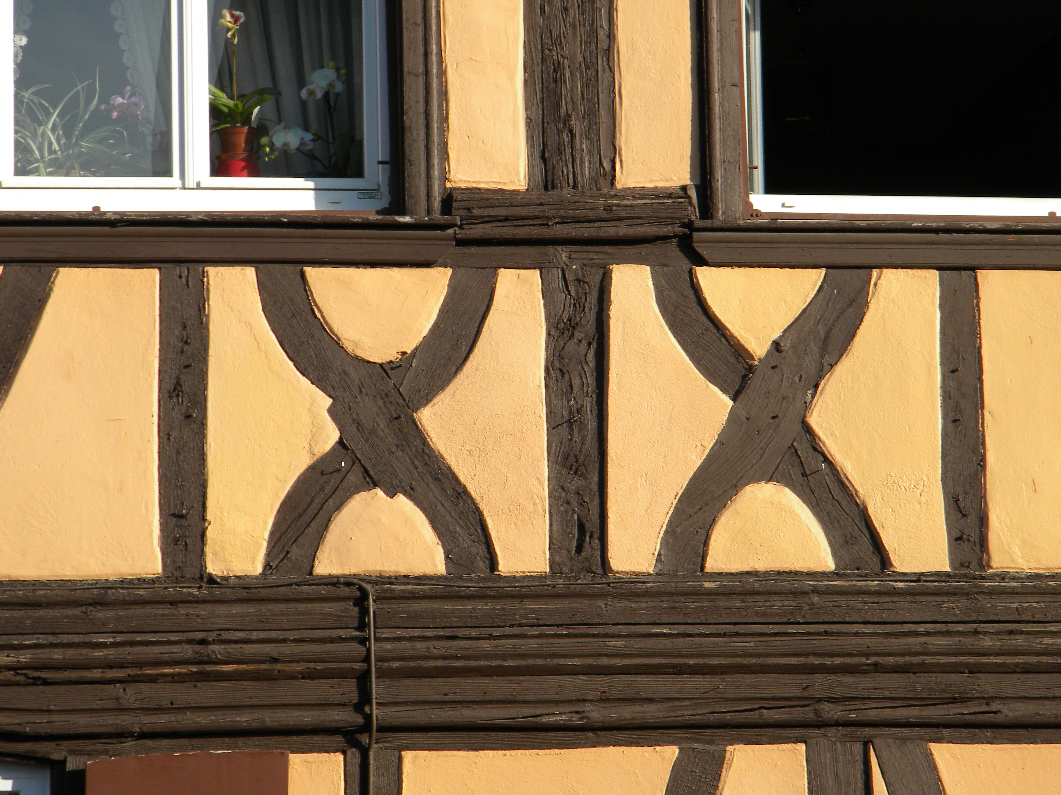 Lipsheim siège curule